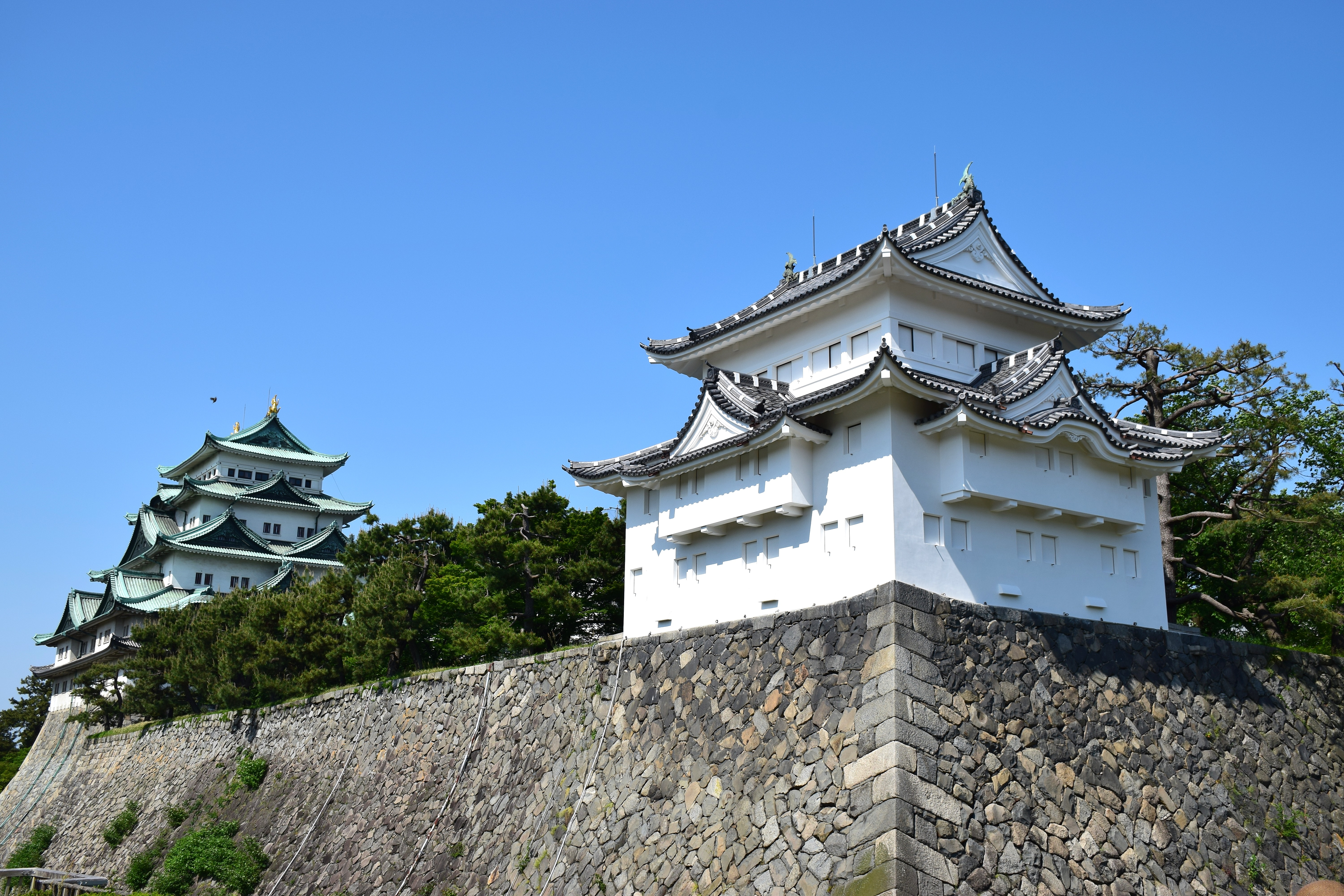 名古屋城天守と西南隅櫓